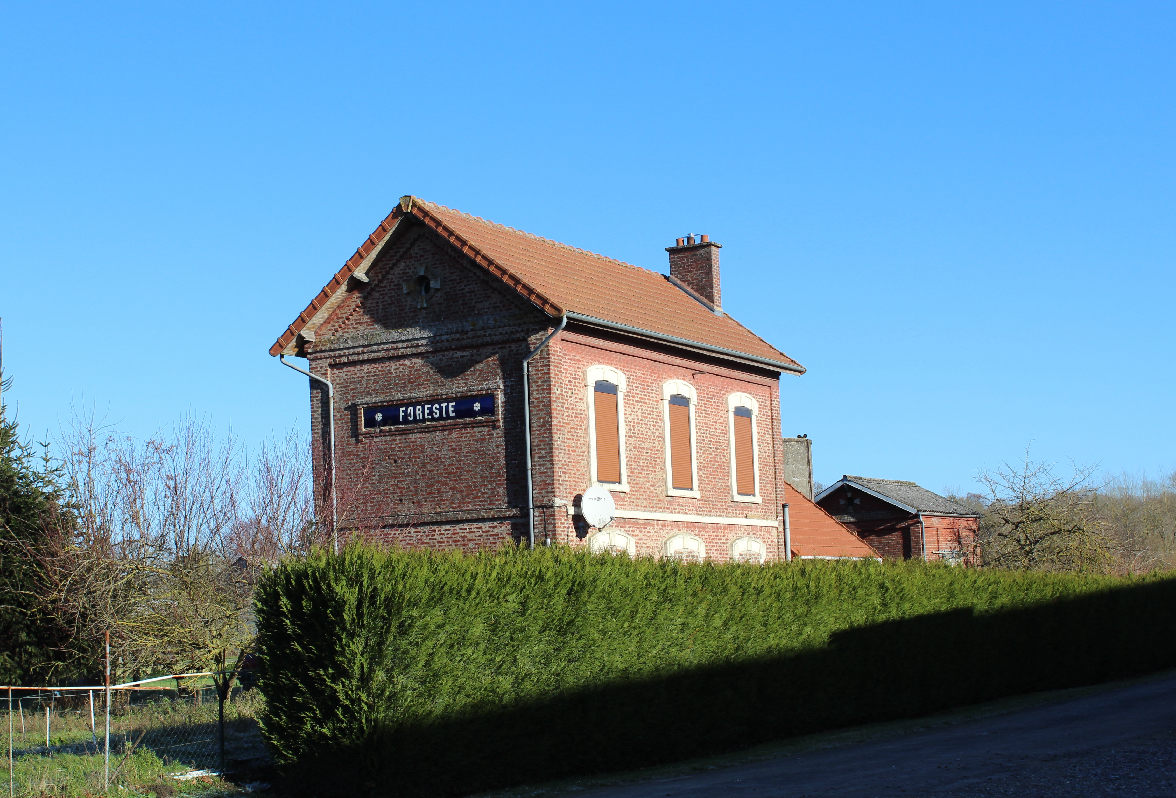 L'ancienne gare.